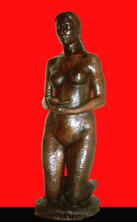 Offrandre, sculpture en bois d'une femme agenouillée par Enrico Campagnola.